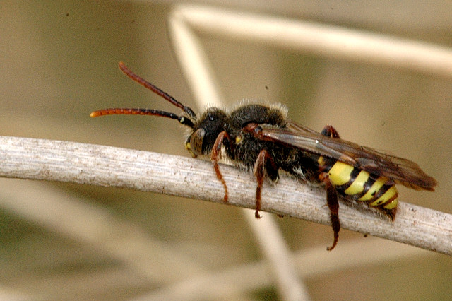 Nomada flava male from Commanster, Belgian High Ardennes .